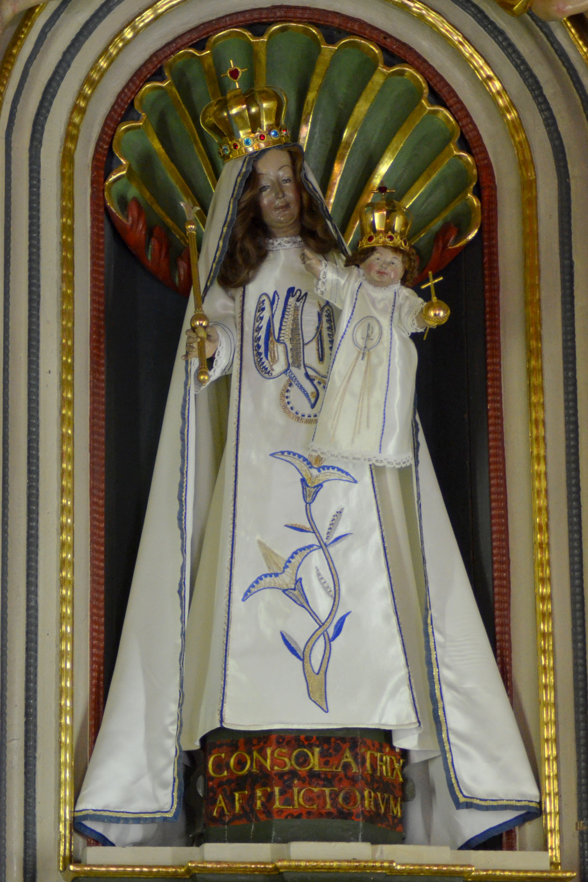 Genadebeeld